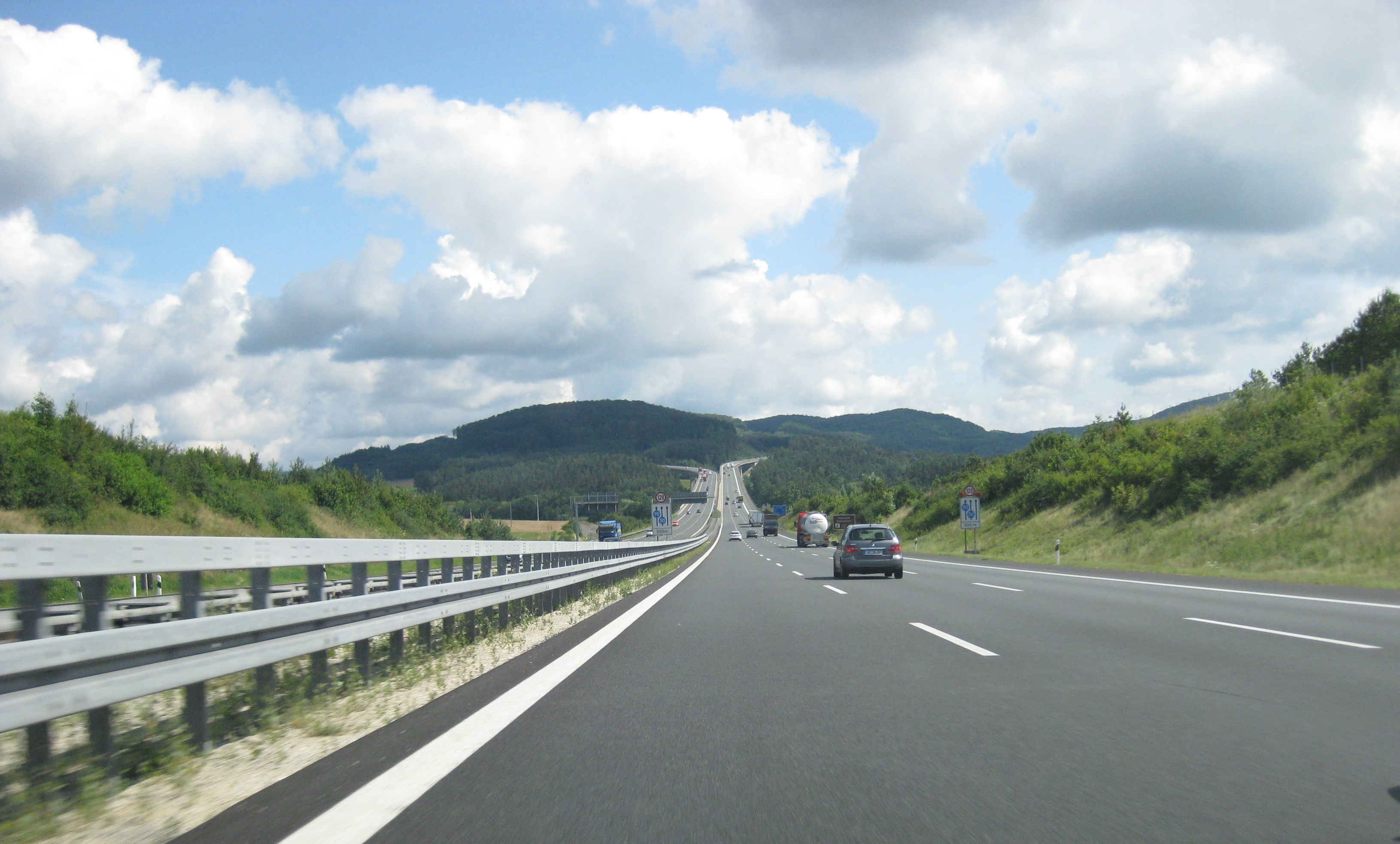 Südrampe des Hienberg